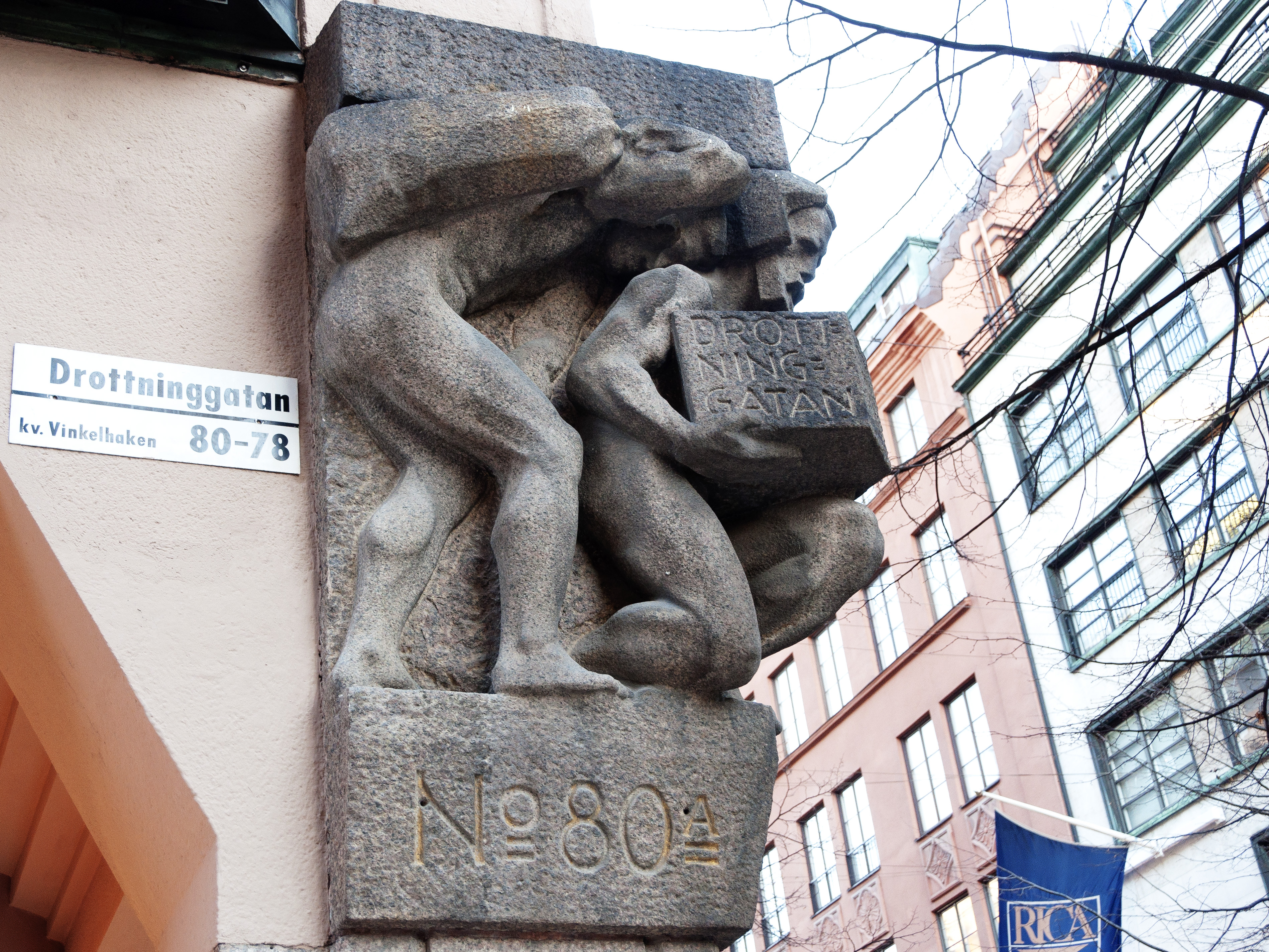 Kungsgatan 52, Drottninggatan 78. Byggnadsår 1913-15, arkitekt Erik Josephson, byggherre Fastighets AB Filia , byggmästare G Hesselman.